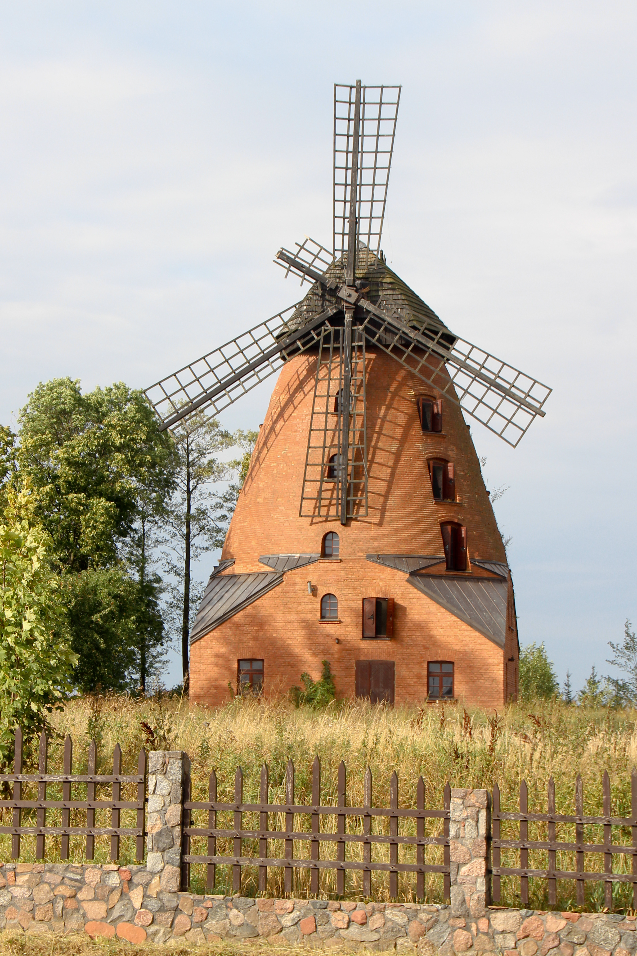 Stara Różanka wieś w Polsce w województwie warmińsko-mazurskim, w powiecie kętrzyńskim, w gminie Kętrzyn.